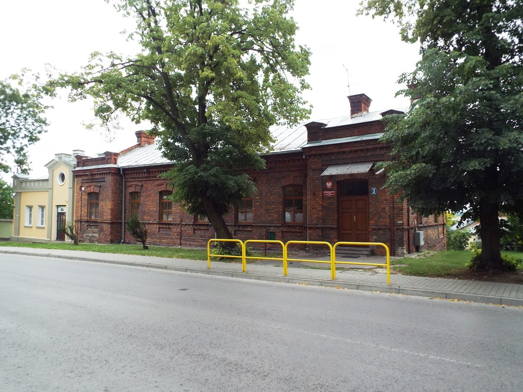 Будинок союз українського кооперативу у Холмі, вул. Люблінська, 3, Фото І. Парнікози. 2017 р.